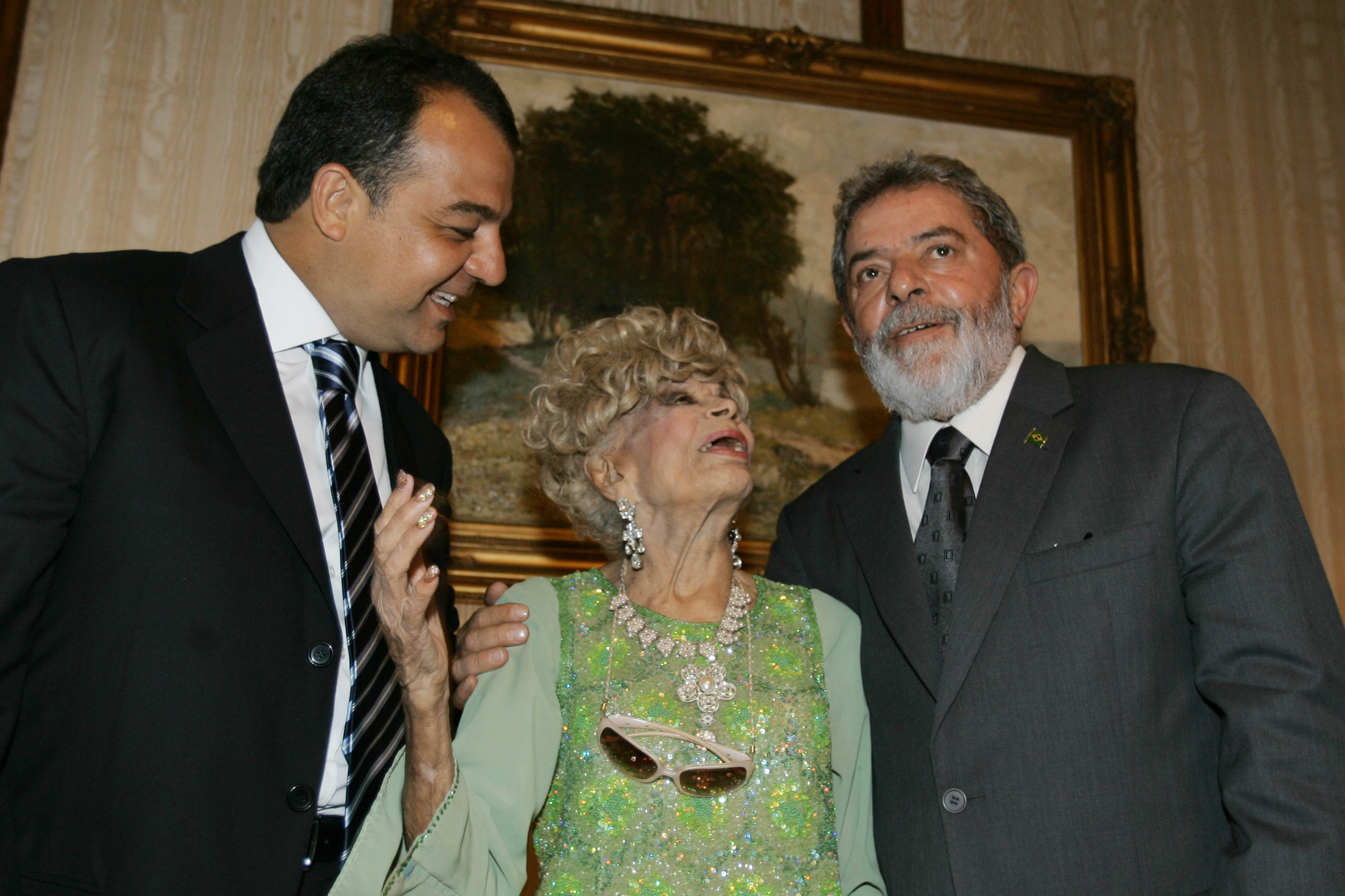 A quase centenária atriz brasileira Dercy Golçalves acompanhada pelo governador do Rio de Janeiro, Sérgio Cabral Filho, e pelo presidente Lula.